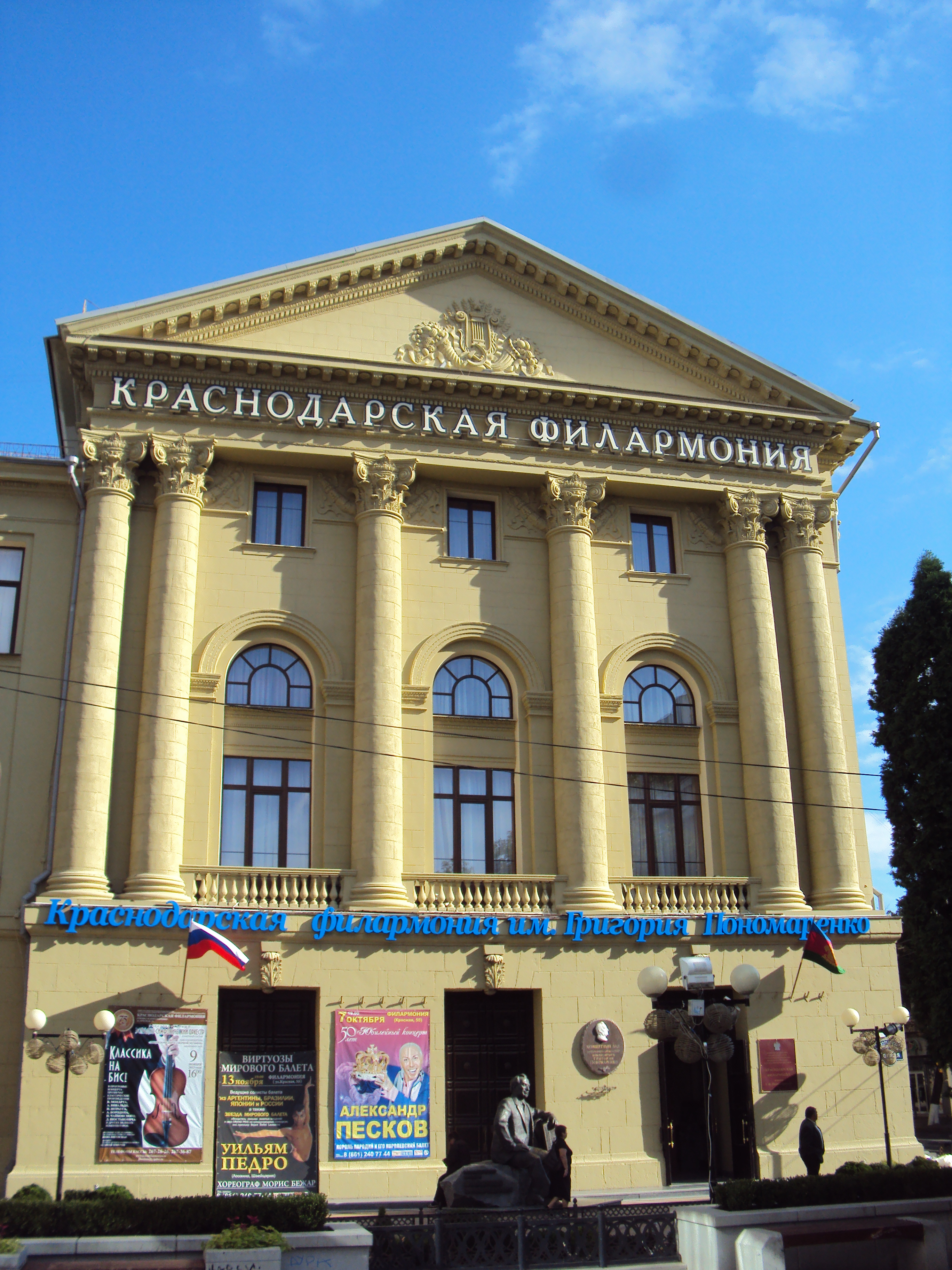 Здание зимнего театра. здесь проходили съезды советов, на которых были приняты решения о создании кубано-черноморской советской республики и северо-кавказской советской республикии выступал орджоникидзе г. к. здесь же выступал певец собинов л. в. (Краснодарский край, Краснодар, красная улица, 55)